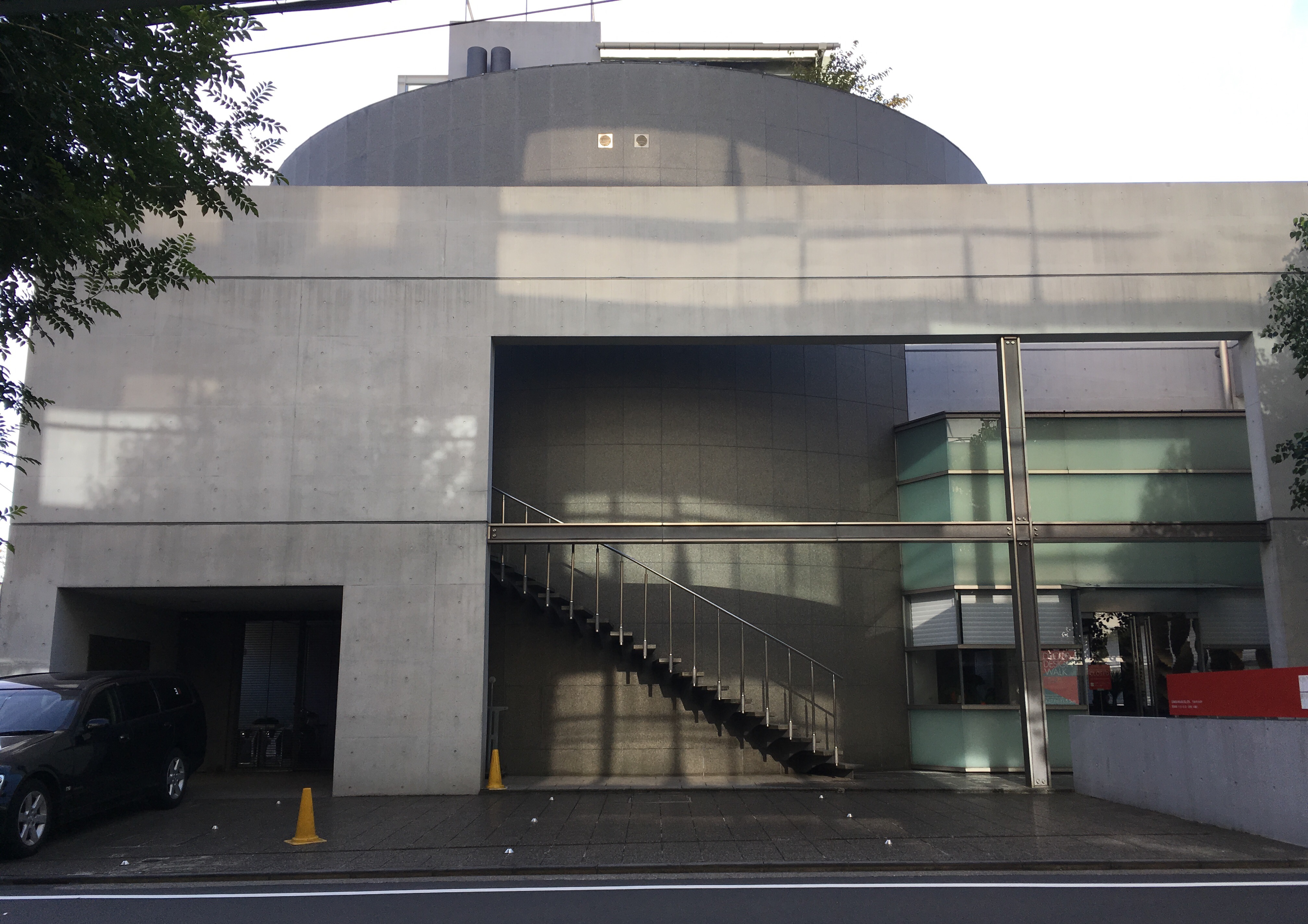 戸尾任宏の建築作品